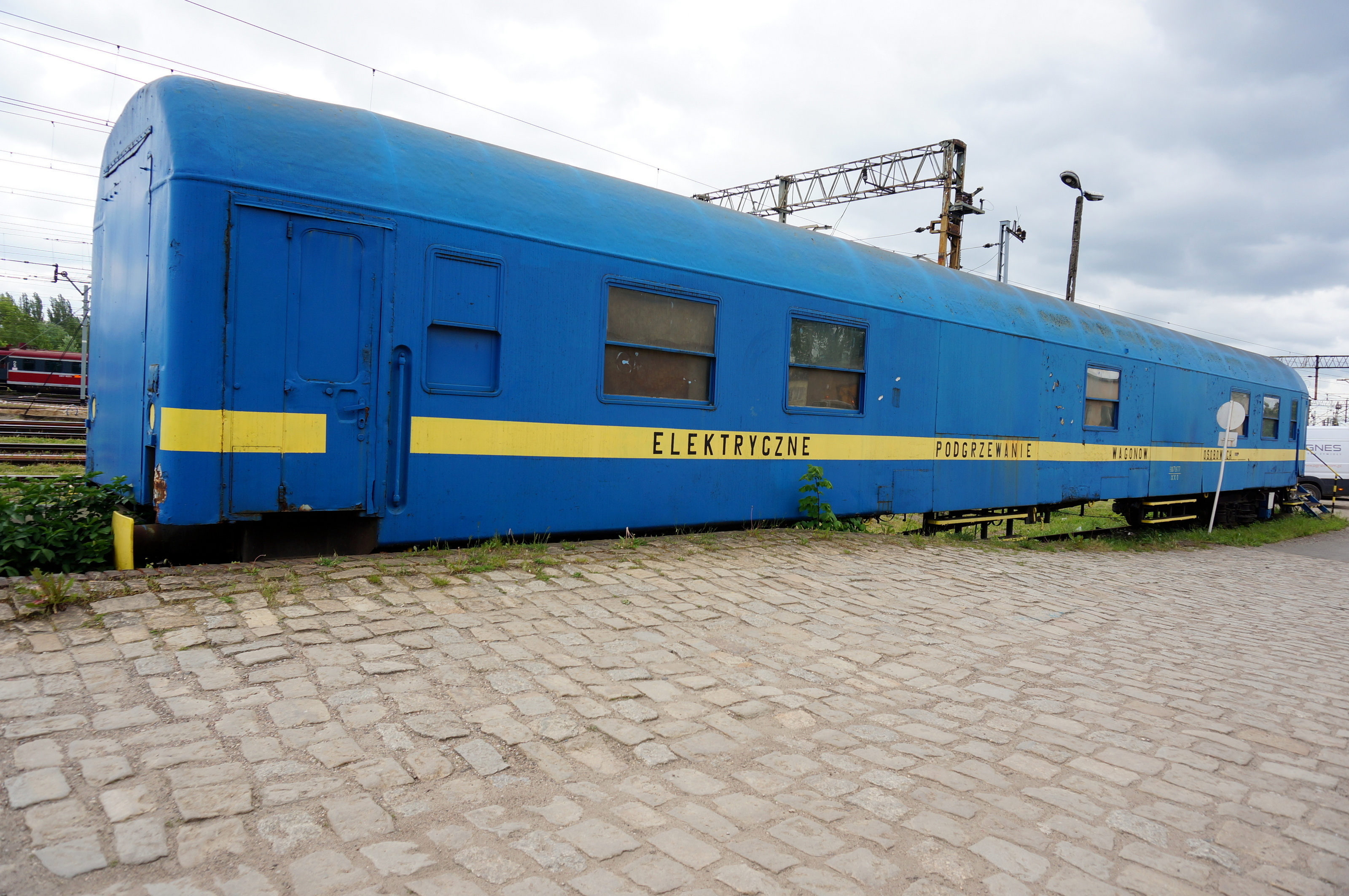 Węzeł kolejowy w Poznaniu. Wagon "Elektryczne Podgrzewanie Wagonów Osobowych"